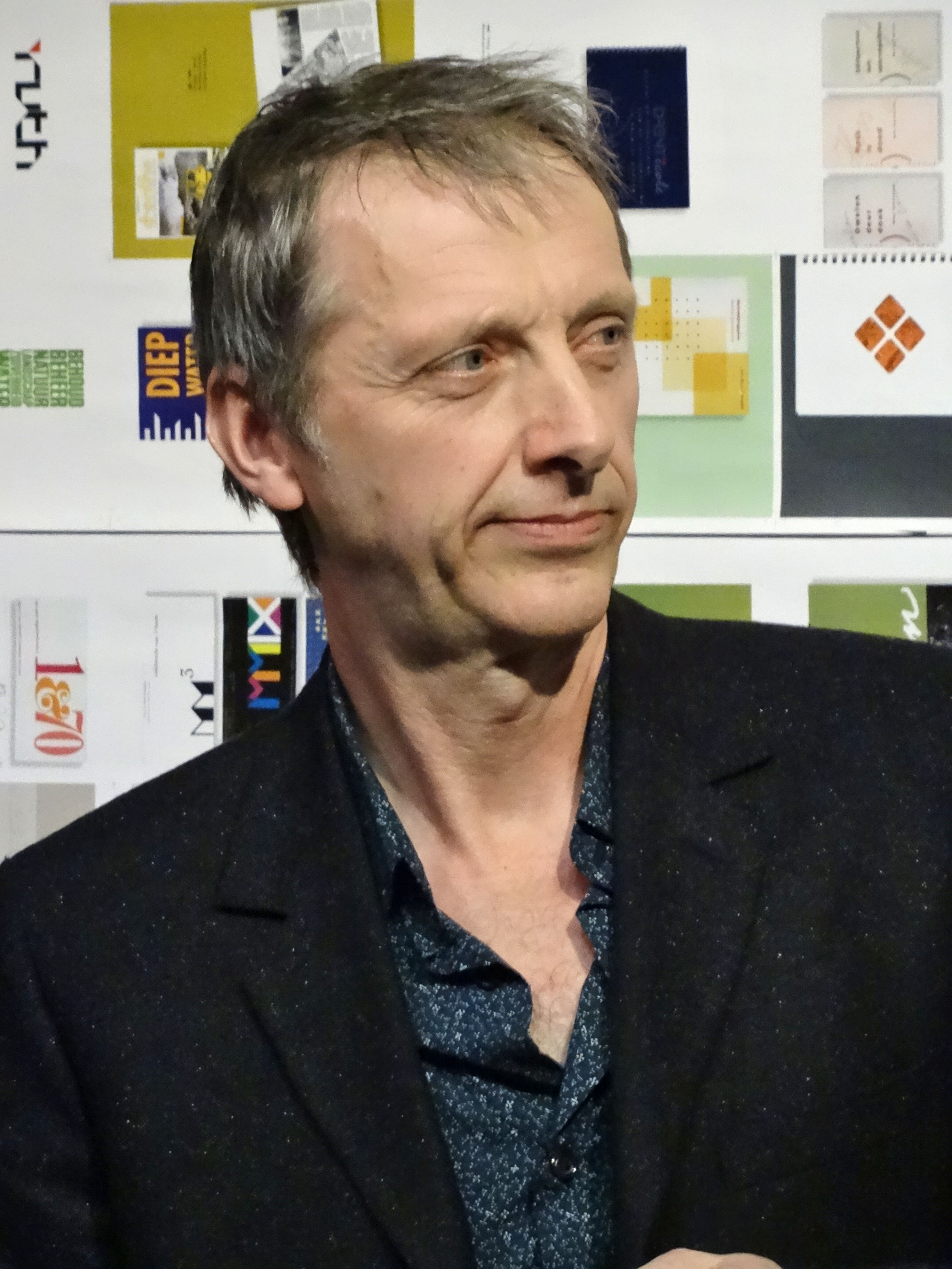 Sam Drukker tijdens de opening van 'drukwerk zonder werkdruk', een duotentoonstelling van Flip Drukker en Albert Rademaker, georganiseerd door het Drents Schildersgenootschap (2017).